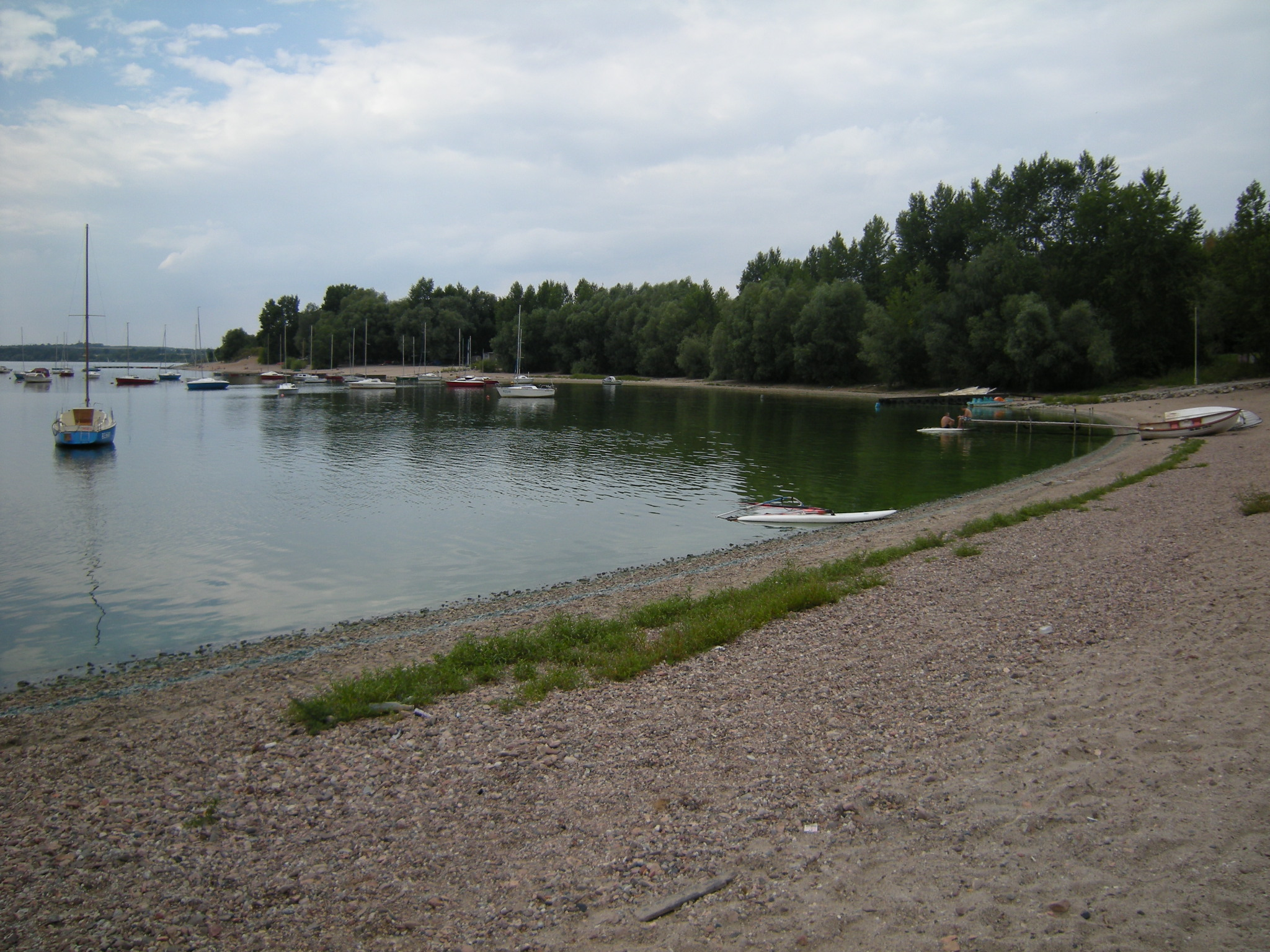 Brzeg jeziora Mietkowskiego